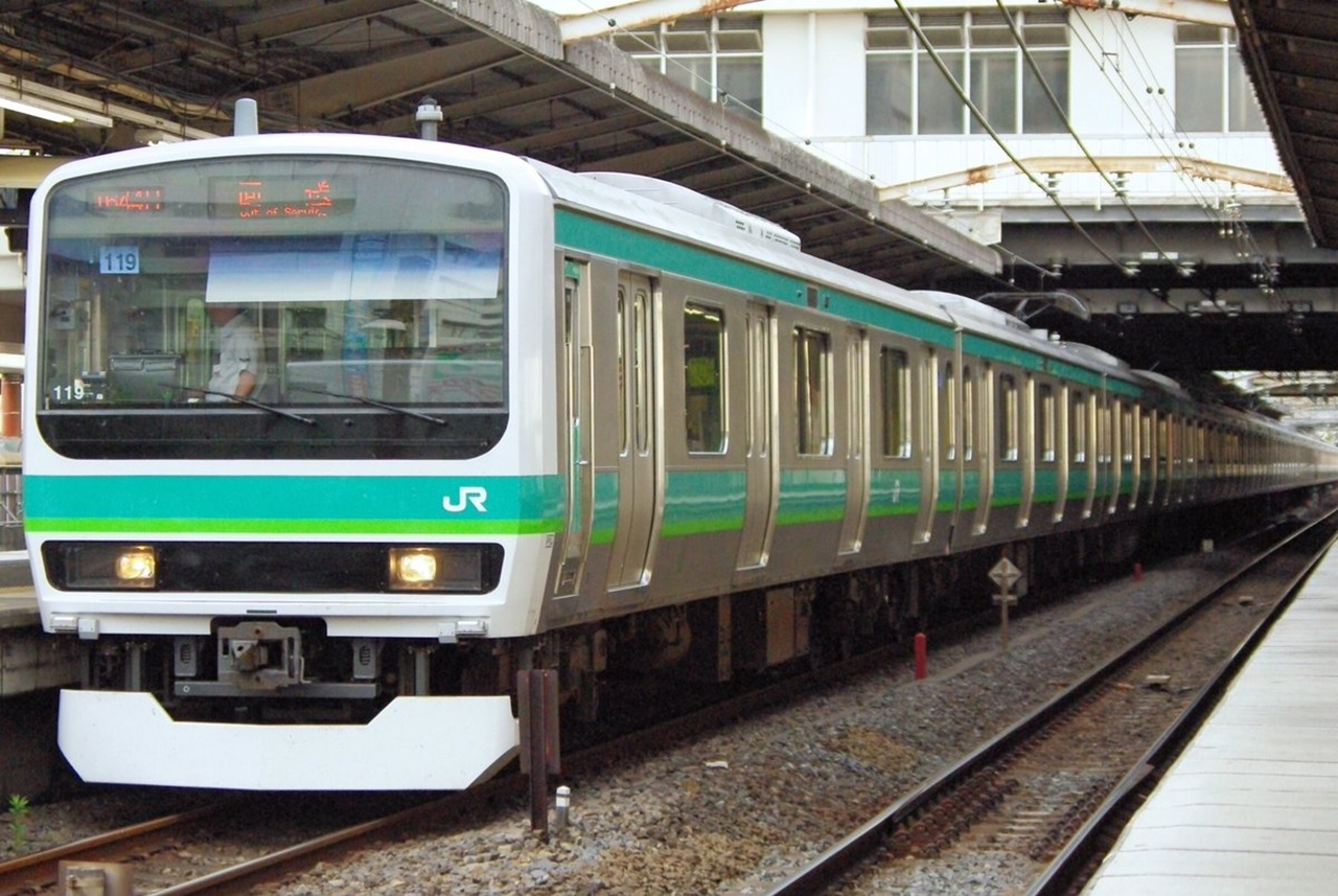 中央・総武緩行線から常磐快速線に転属したマト119編成(元ミツB21編成)